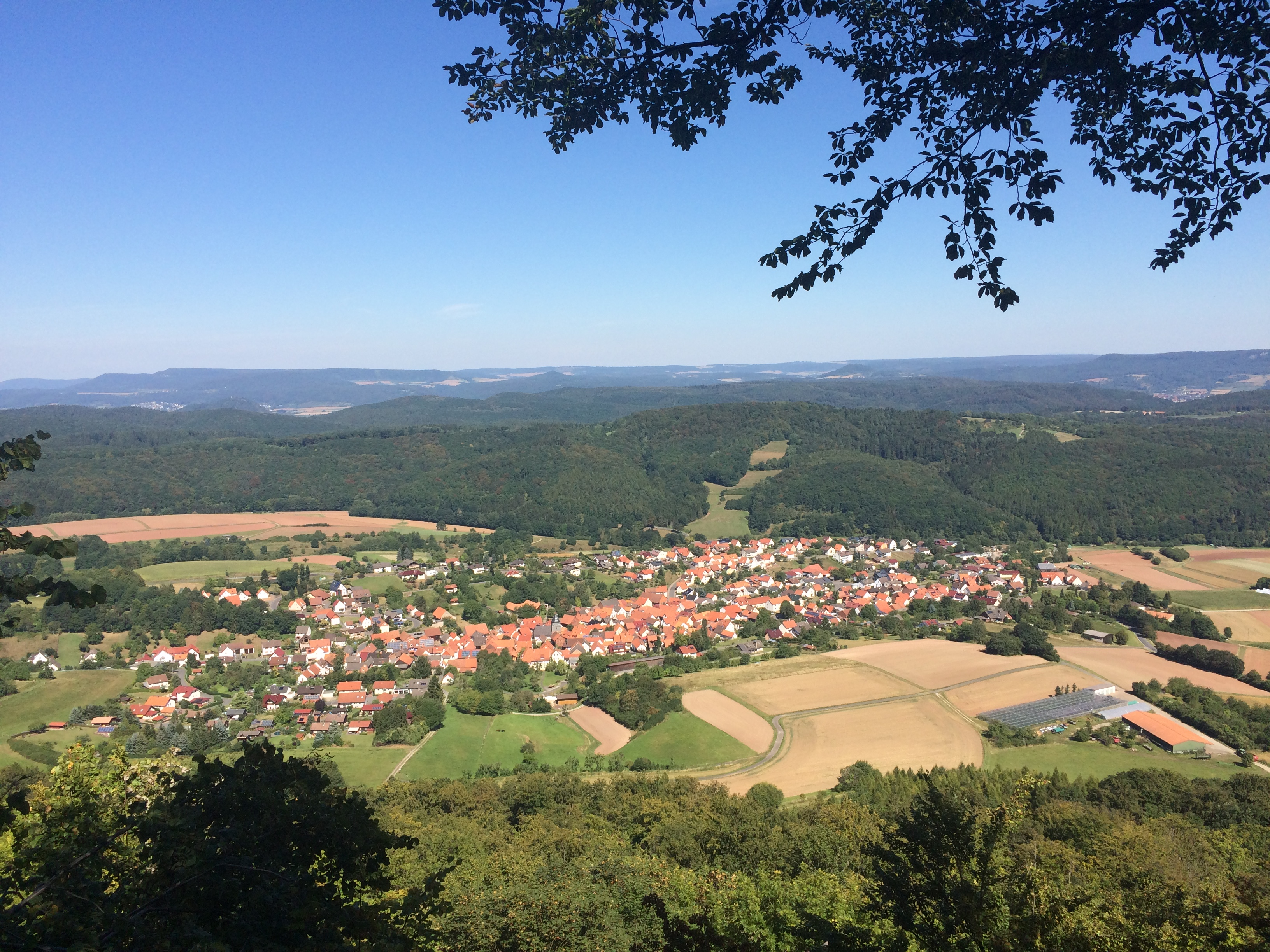 Blick vom Aussichtspunkt Anger (495 m) auf Weißenborn, dahinter der Schlierbachswald, im Hintergrund die Höhen des Obereichsfeldes; Werra-Burgen-Steig Hessen (X5H)